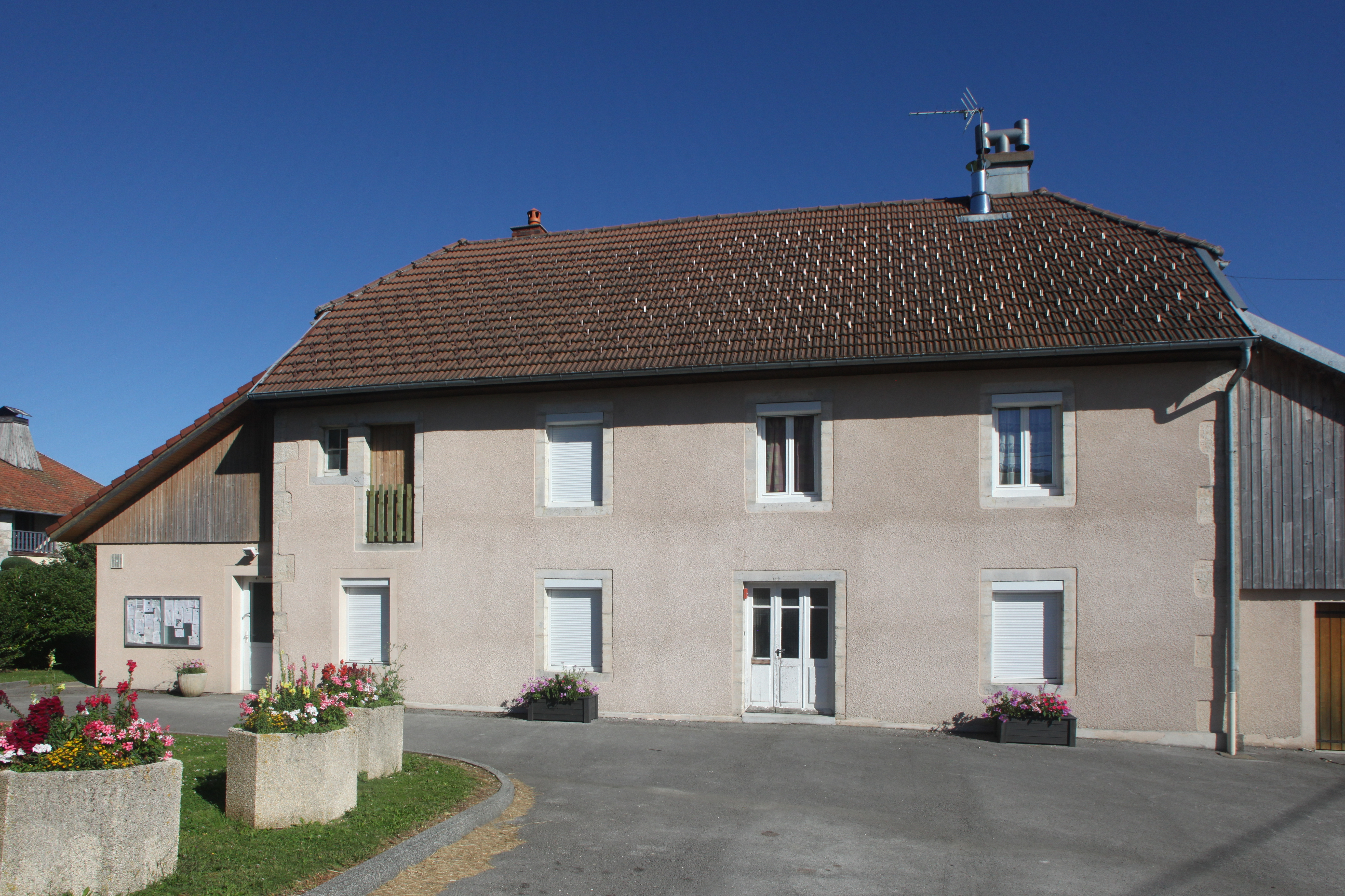 Mairie de Chevigney-les-Vercel (Doubs).